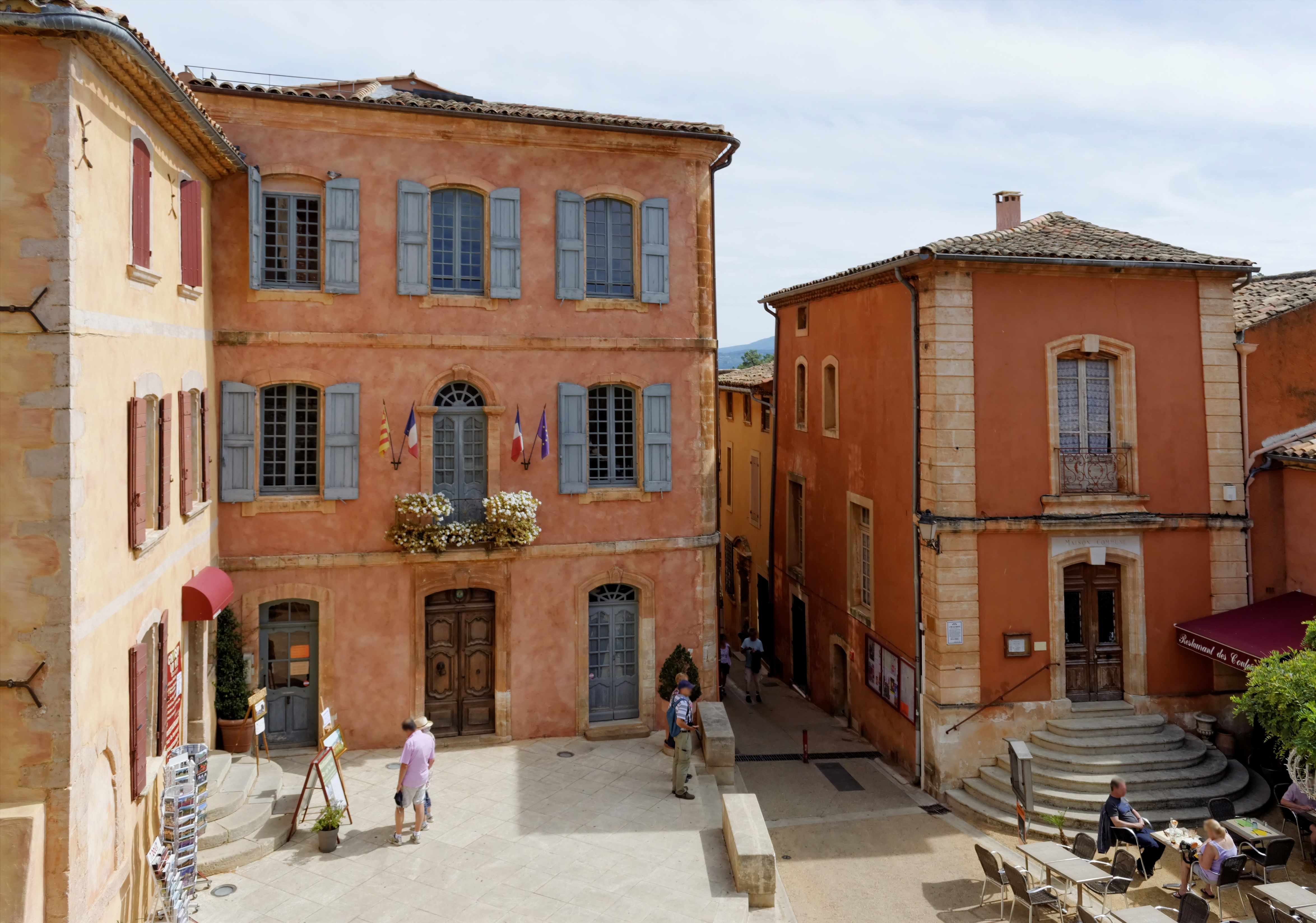 Place du village de Roussillon (Vaucluse)